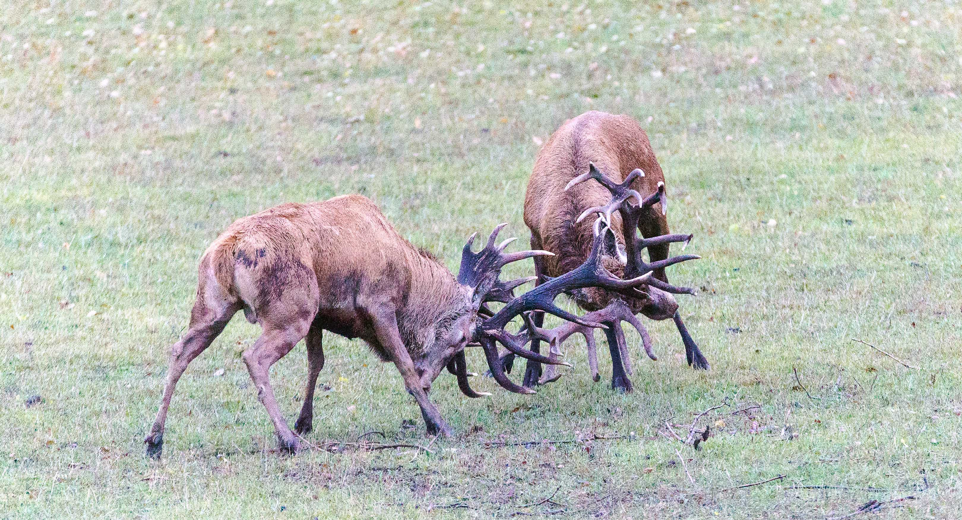 Zwei kämpfende Rothirsche im Rothirschgehege von Zacharis in Mammerow (Groß Wokern), Mecklenburg.